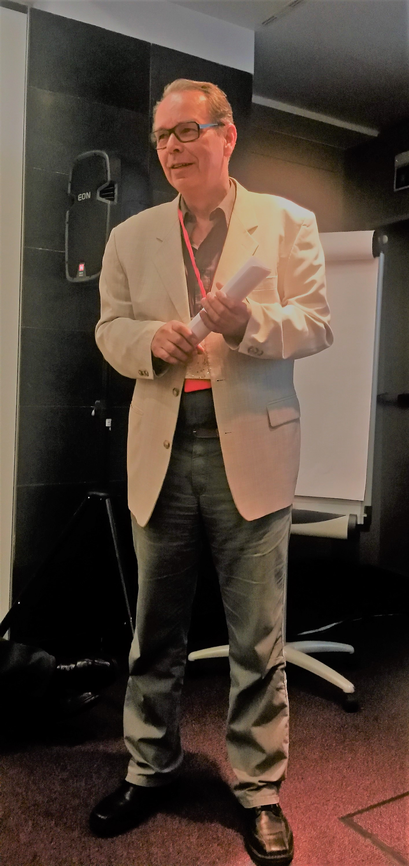 Reinhold Zilch (2015)